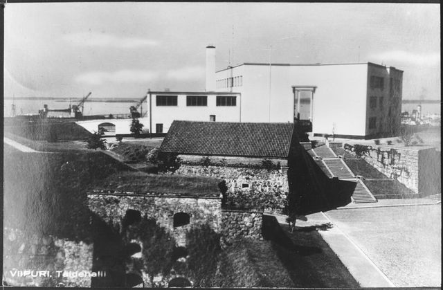 Viipurin taidemuseo